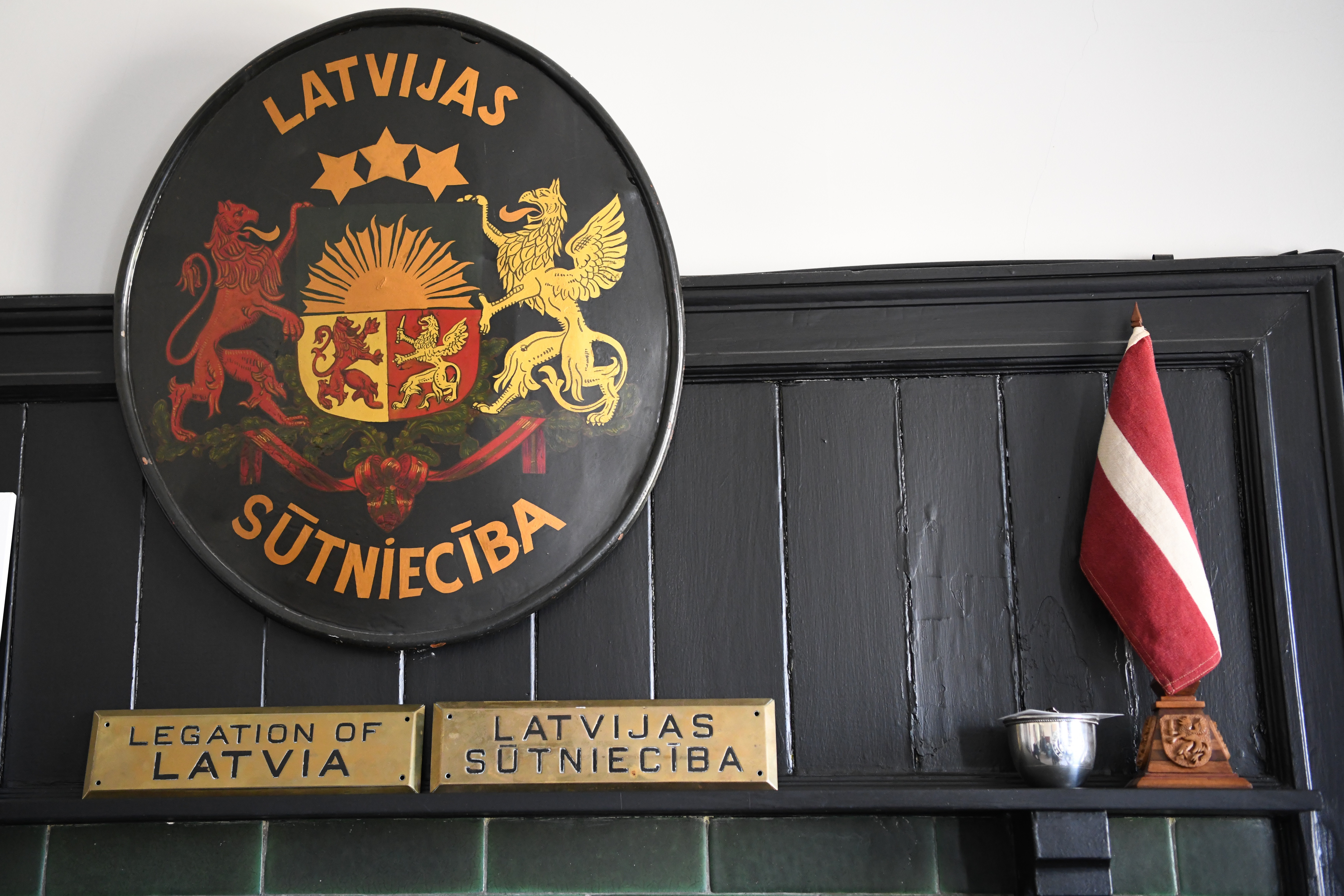 2020.gada 5.marts. Latvijas vēstniecība ASV. Foto: Juris Vīgulis, Saeima Izmantošanas noteikumi: saeima.lv/lv/autortiesibas